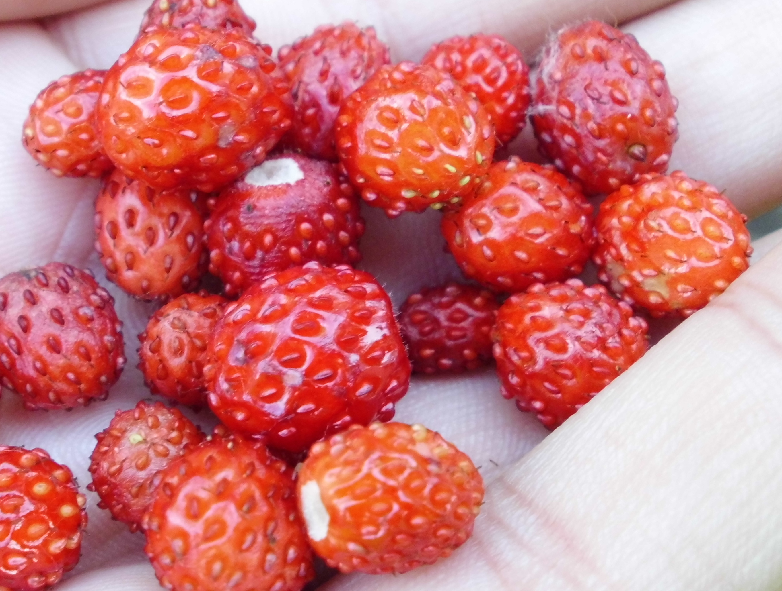 Земляника лесная. Собранные плоды (многоорешки) на ладони.